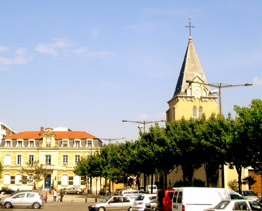 Place Léon Sublet, Vénissieux; FRANCE